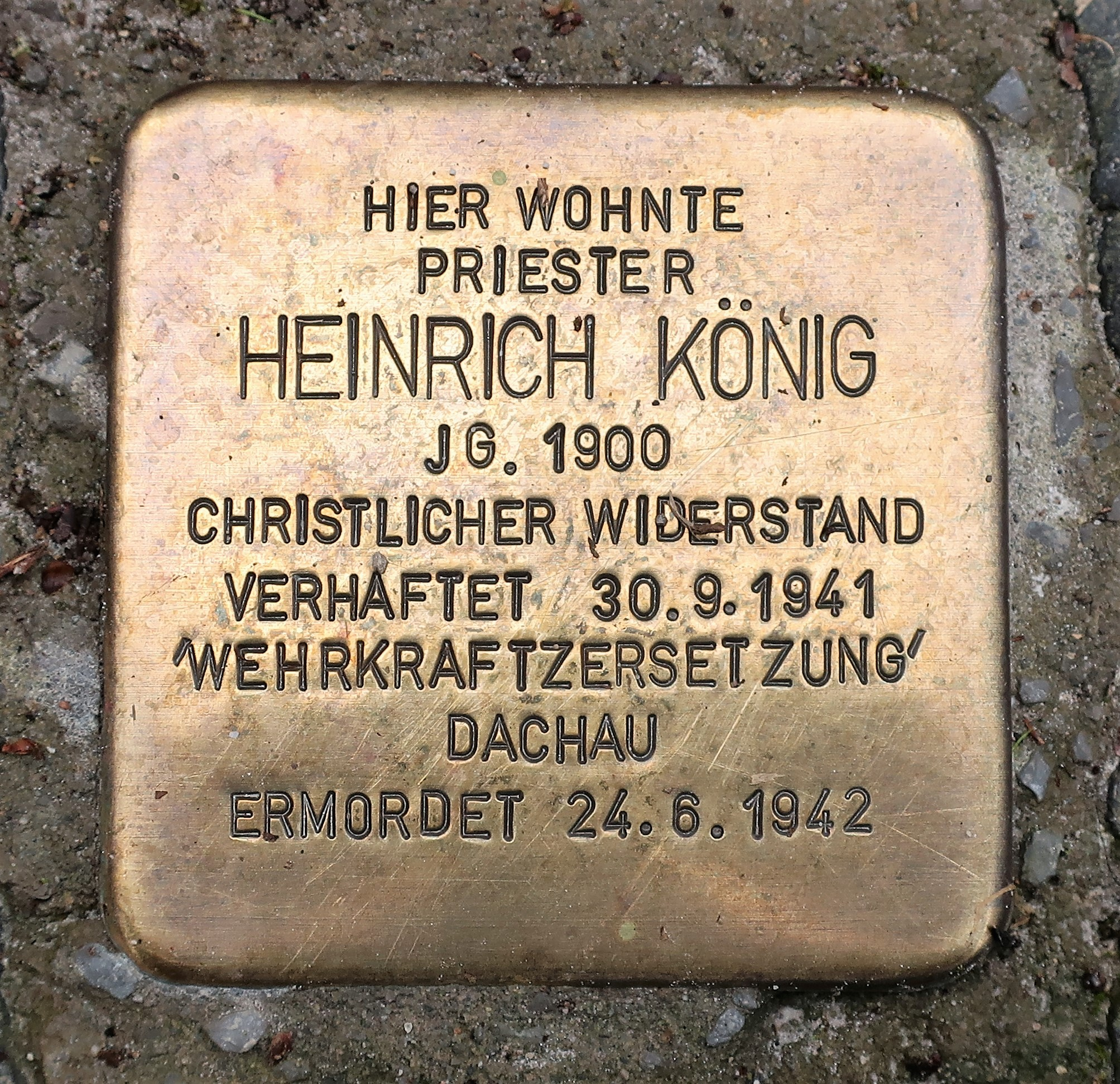 Hagen-Emst, Oberer Altlohweg 14 vor dem Heinrich-König-Haus. Stolperstein für den katholischen Priester und Märtyrer Heinrich König (24.06.1900–24.06.1942). Heinrich König starb im KZ Dachau einen qualvollen Tod nach Menschenversuchen durch die KZ-Ärzte.